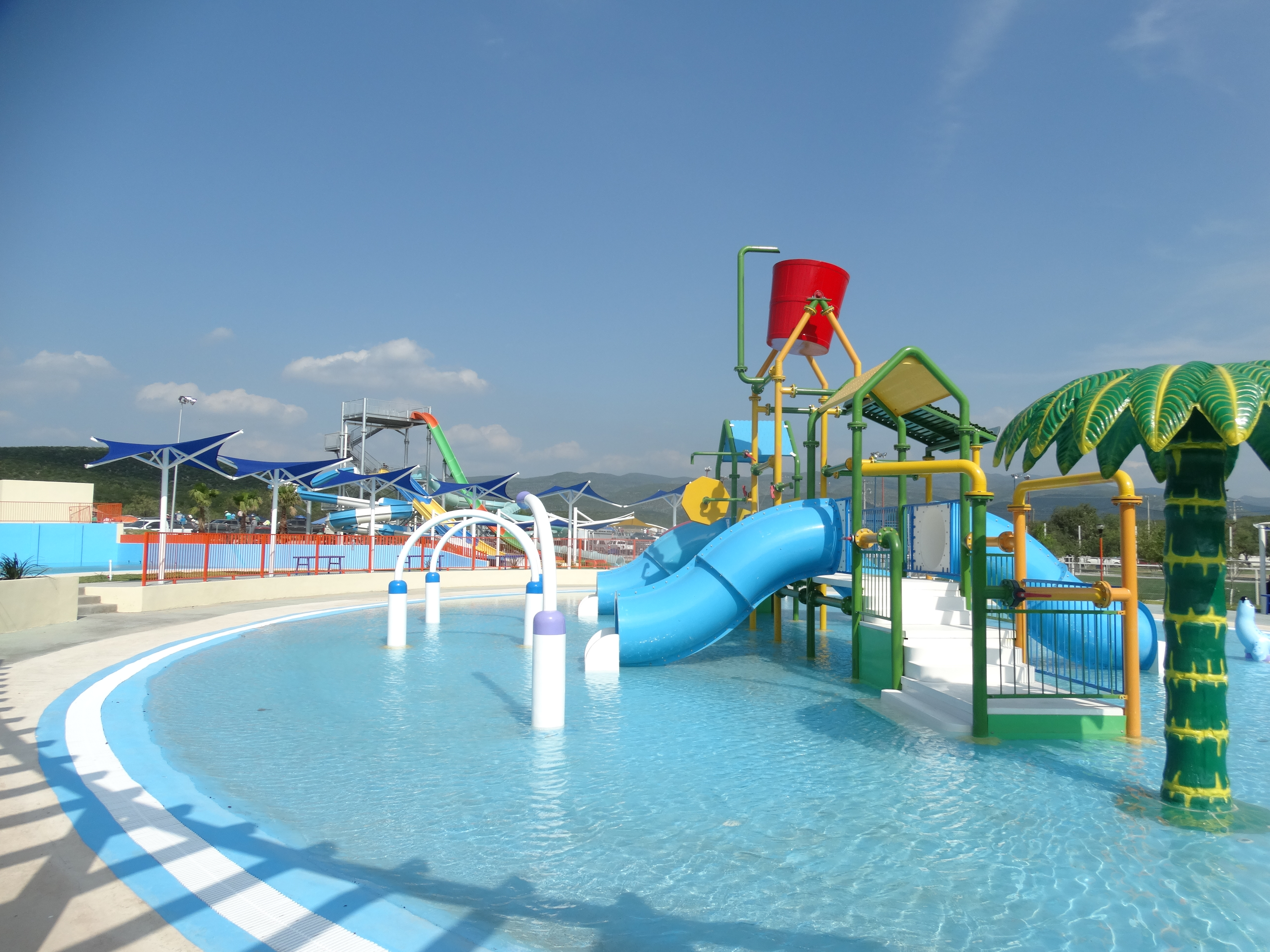 Parque acuático lampazos con 8 toboganes, chapoteadero y alberca de olas